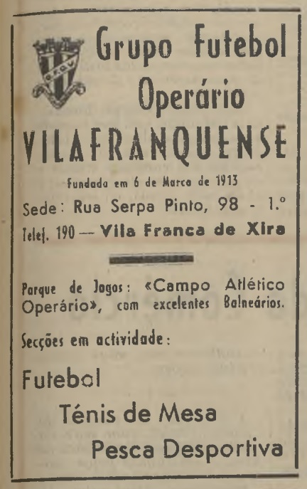 Detalhes do Clube